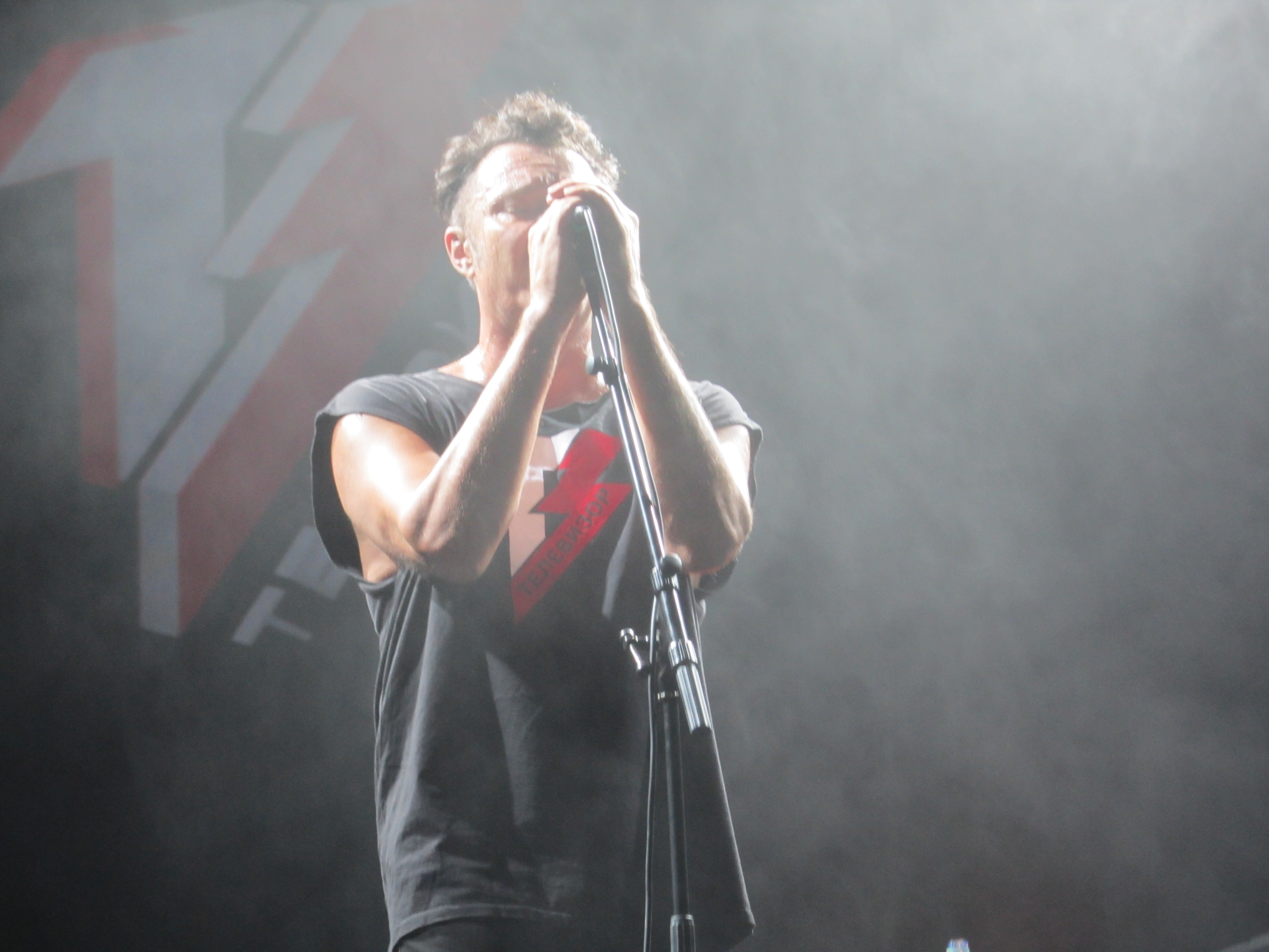 Mikhail Borzykin - Terevizor rock-group Михаил Борзыкин - рок-группа Телевизор